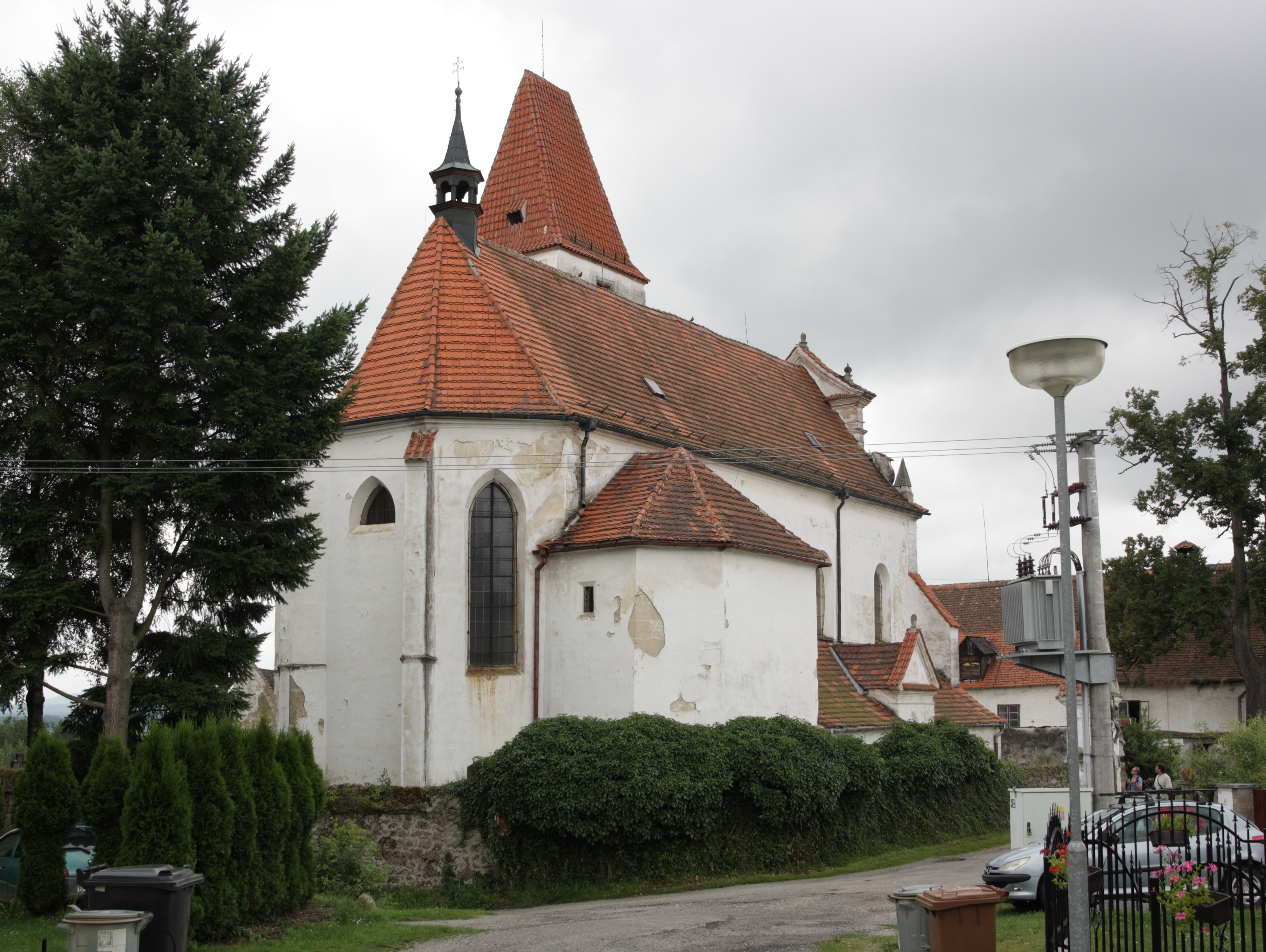 Blansko (Kaplice) - kostel svatého Jiří.